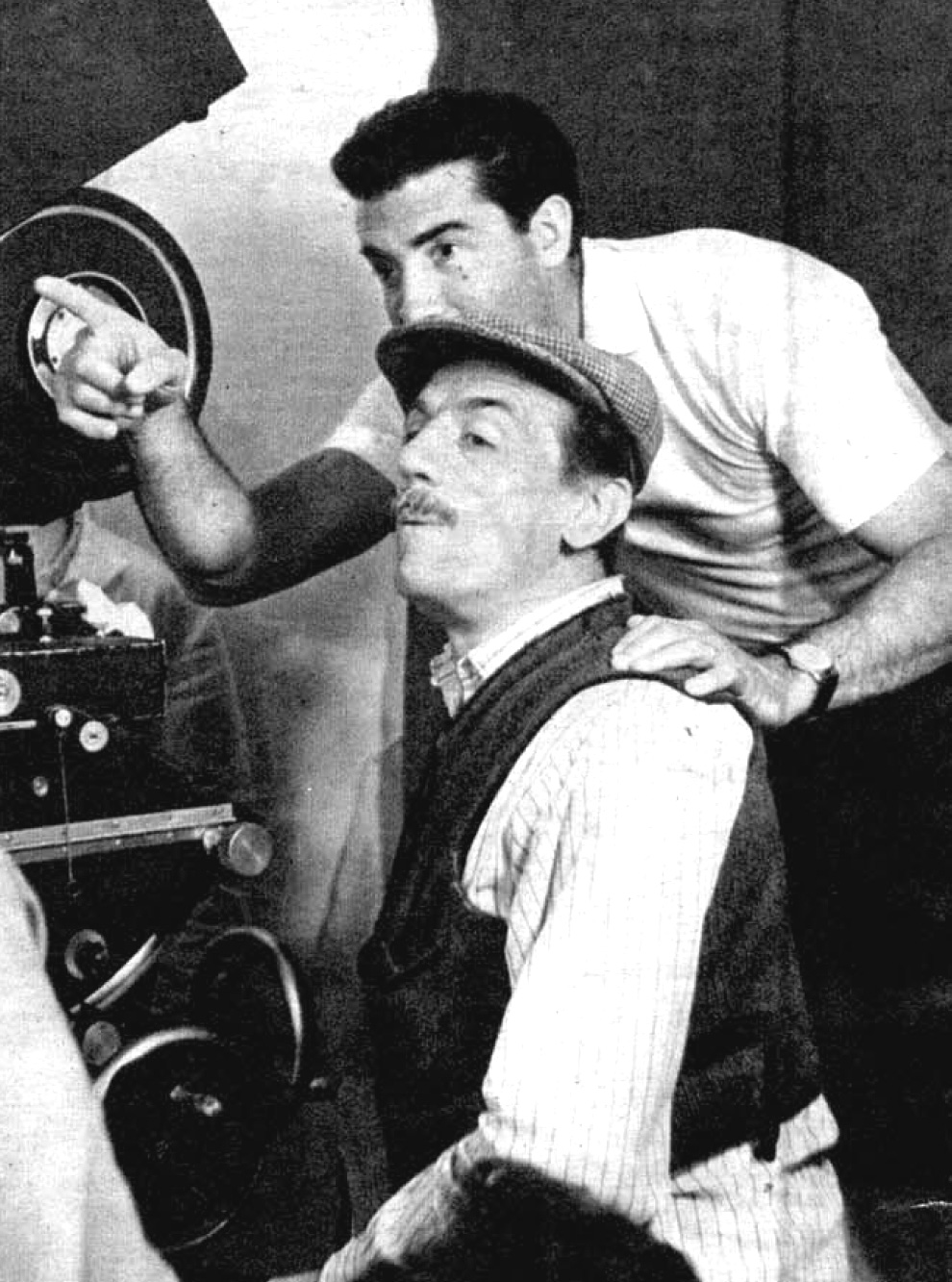 Eduardo De Filippo con il direttore della fotografia Enzo Serafin durante le riprese di "Marito e moglie" (1952) da lui diretto ed interpretato